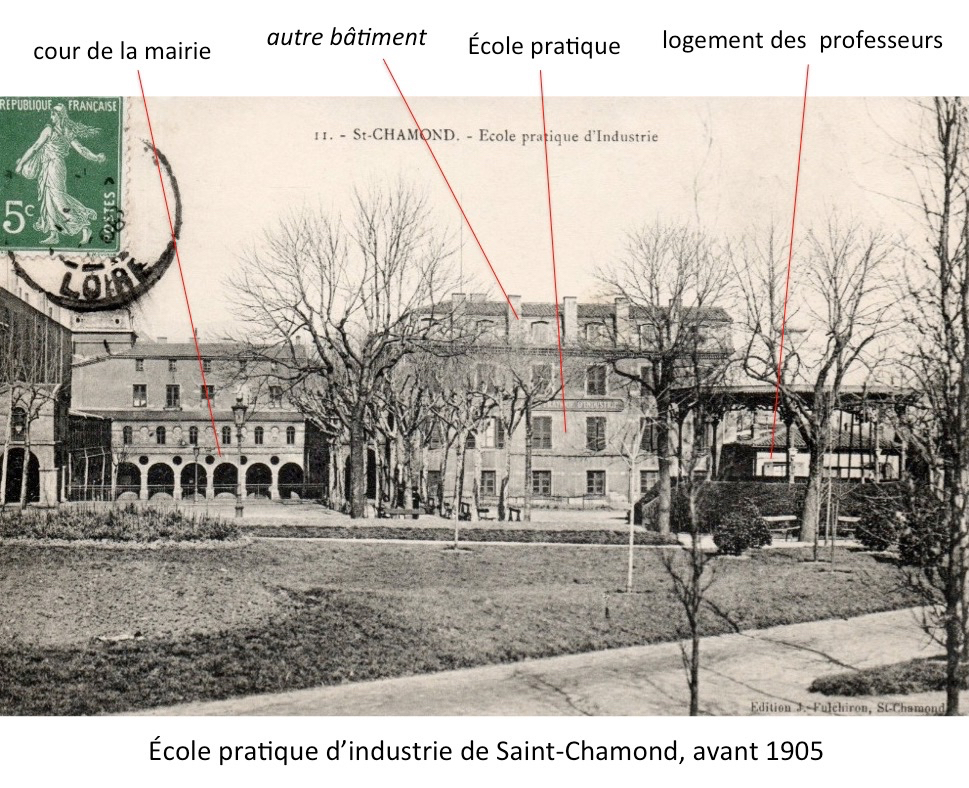 École pratique d'industrie, Saint-Chamond, avant 1905, image légendée. Fichier utilisé : File:École pratique d'industrie, Saint-Chamond, avant 1905.jpg